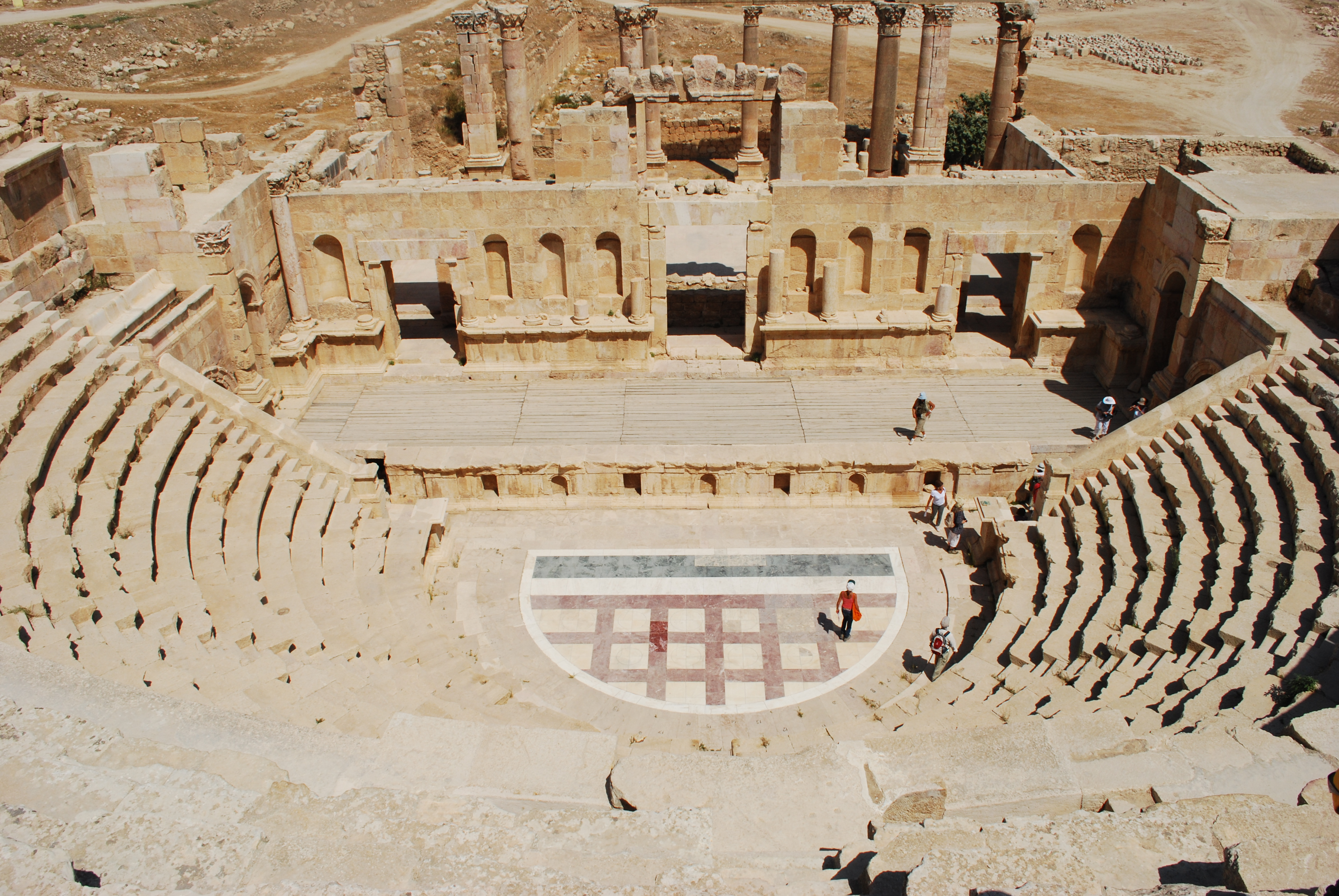 Le théâtre nord de Jerash.